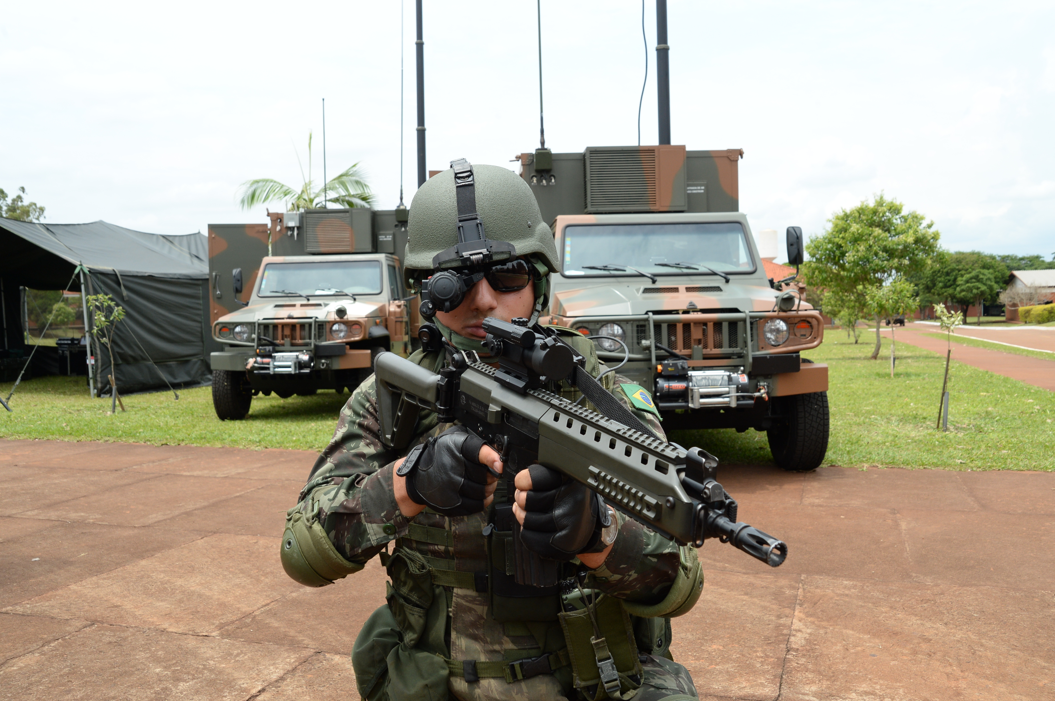 24/10/2014, Dourados - MS Fotos: Jorge Cardoso